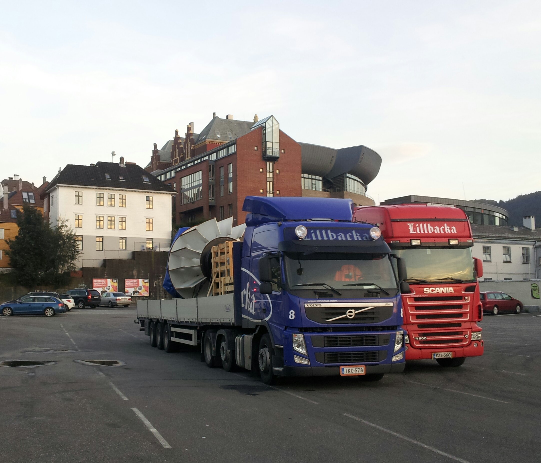 Lillbacka trucks in Bergen Norway in September 2012